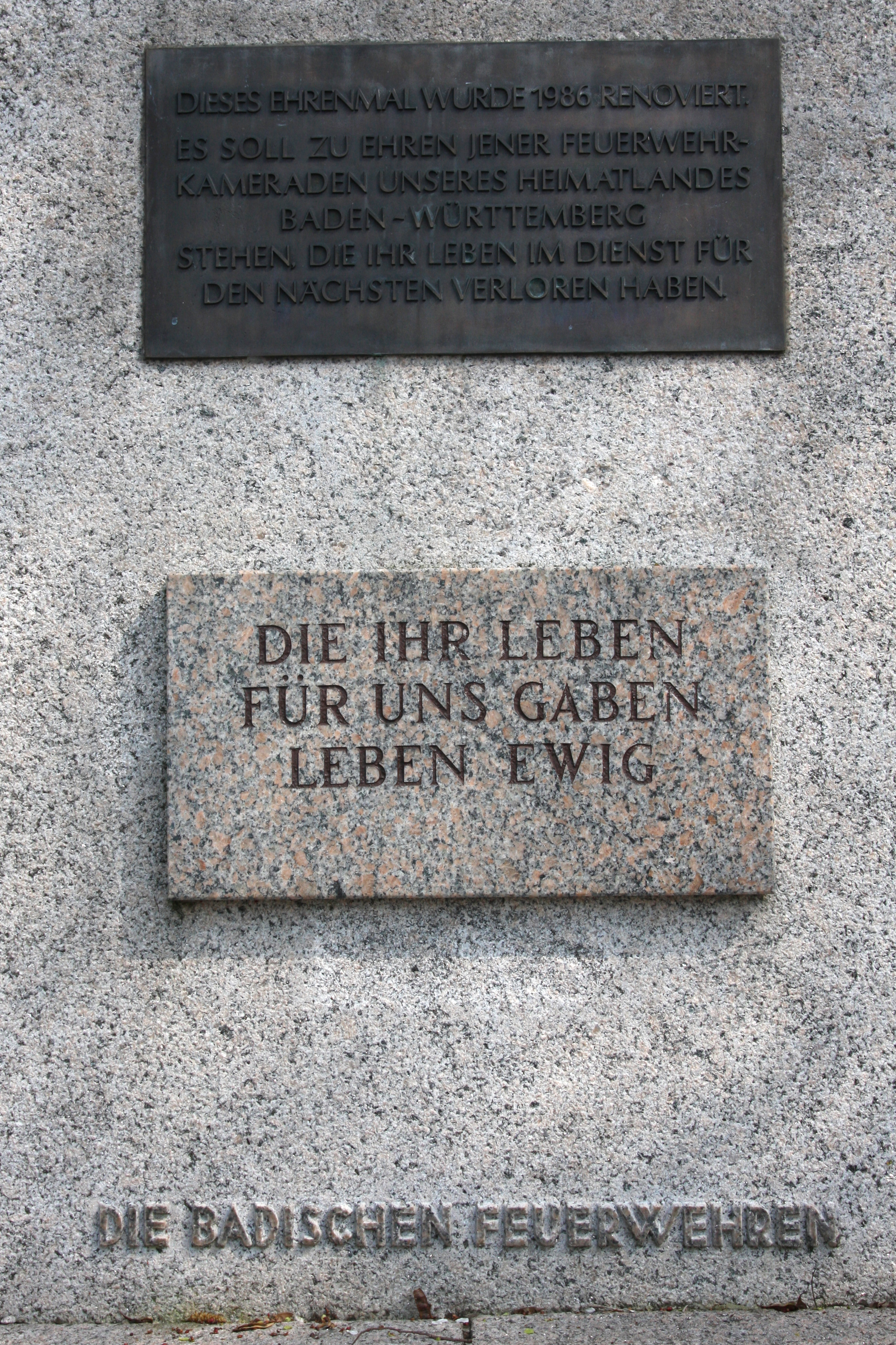 Inschriften am Sockel des Landes-Feuerwehr-Ehrenmals Baden-Württemberg in Achern (Deutschland, Ortenaukreis), 1936 erbaut. Das Denkmal steht zu Ehren der Feuerwehrleute Baden-Württembergs, die ihr Leben im Dienst für den Nächsten verloren haben. Es wurde vom Karlsruher Bildhauer Karl Dietrich nach einem Entwurf des Architekten Franz Kuhn aus Heidelberg gefertigt.